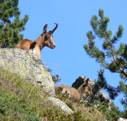 observation d'un isard avec l'Obsevatoire de la montagne dans la Réserve Nationale d'Orlu